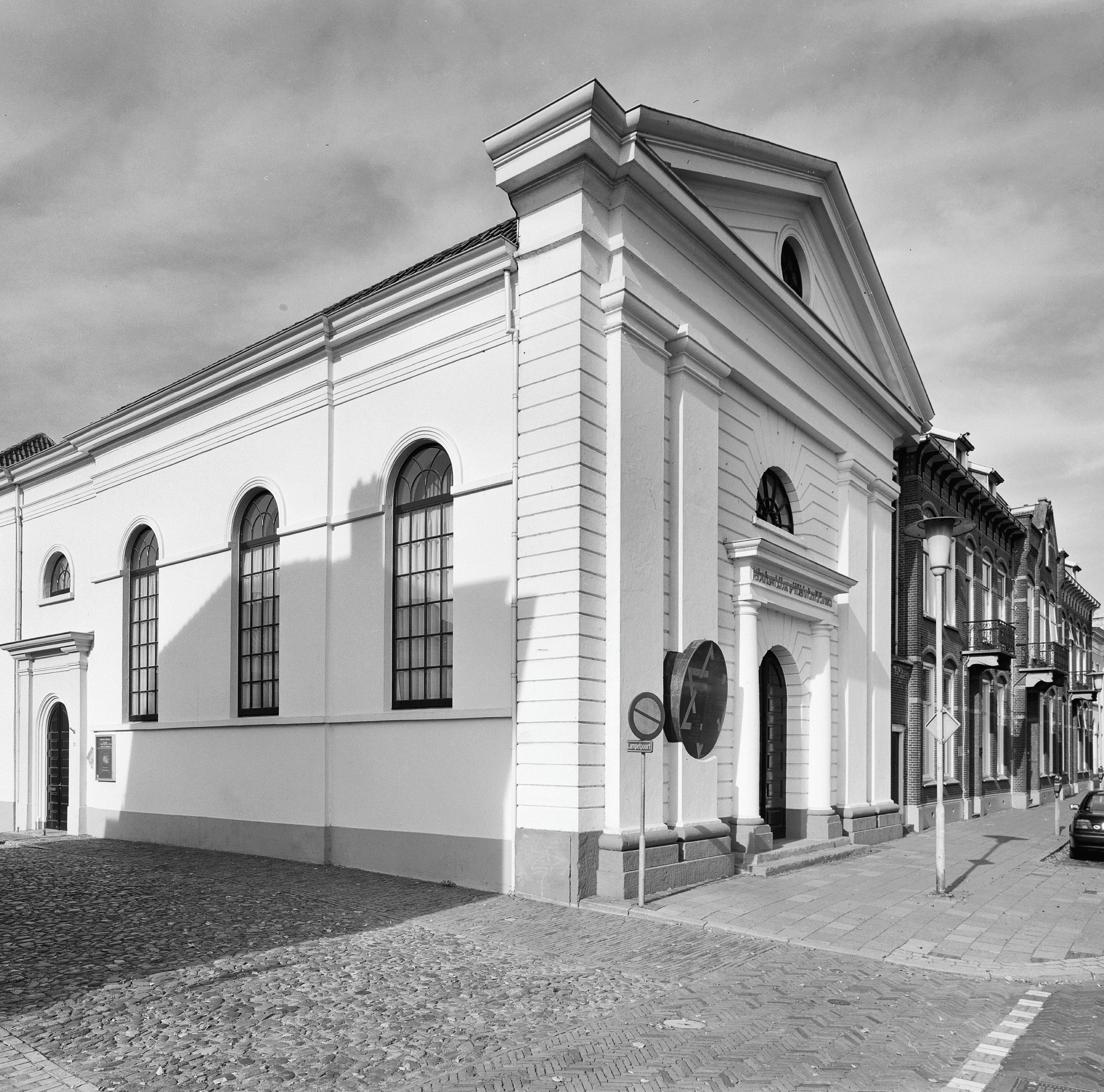 Voormalige synagoge: De voorgevel en linker zijgevel van de voormalige synagoge te Kampen (opmerking: Gefotografeerd voor Monumenten In Nederland Overijssel, bladzijde 193)